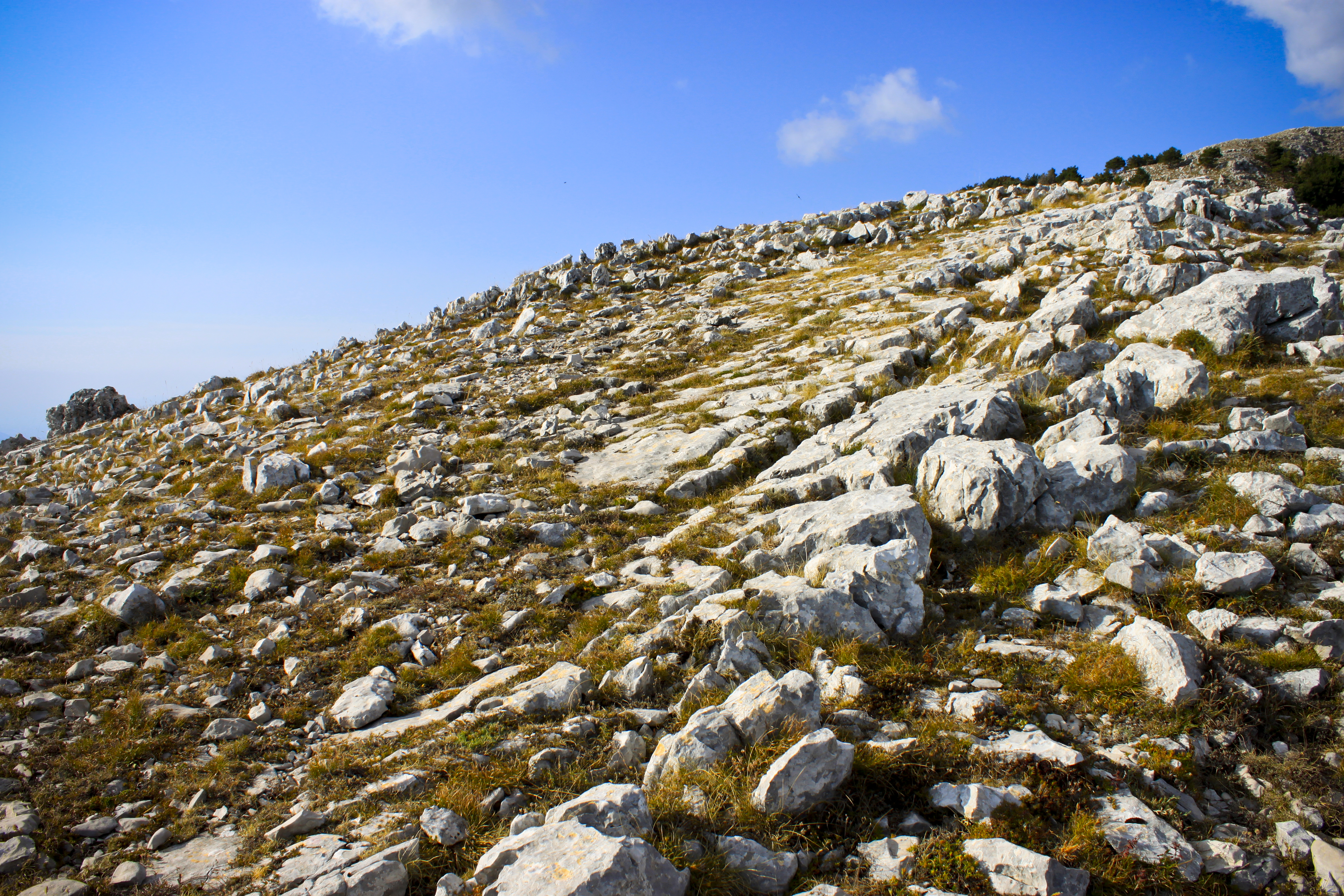 Fotografia di Gabriele Altimari